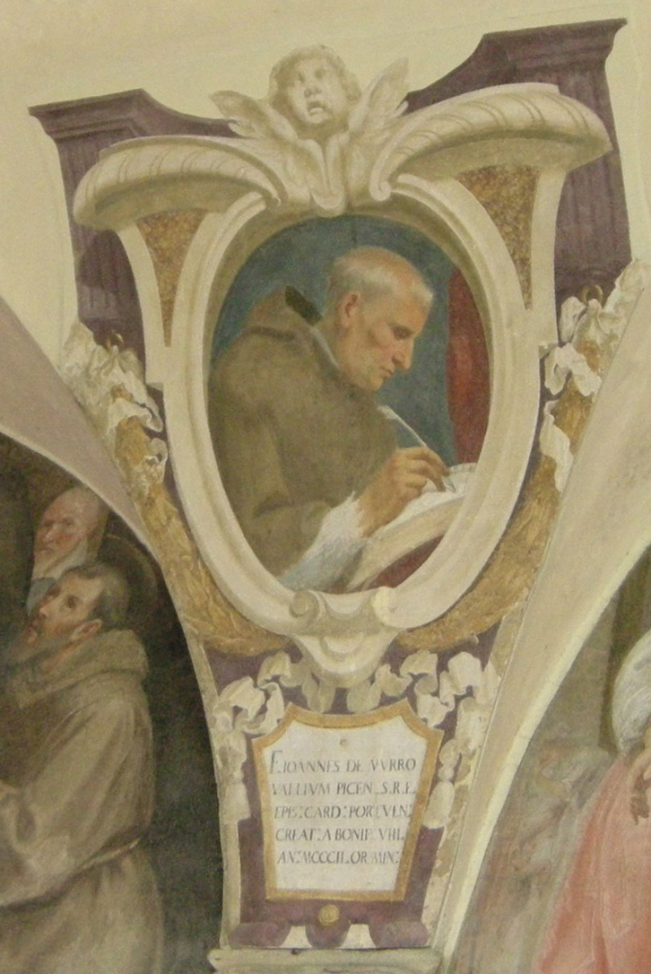 Chiostro di ognissanti, personalità francescane 15 Giovanni da Morrovalle